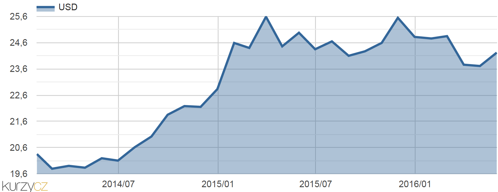 USD - Devizové kurzy ke konci měsíce